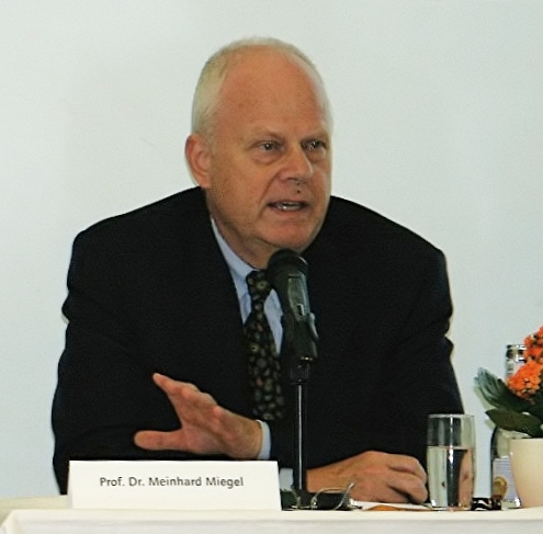 Prof. Dr. Meinhard Miegel in der Kath. Landvolkshochschule Freckenhorst